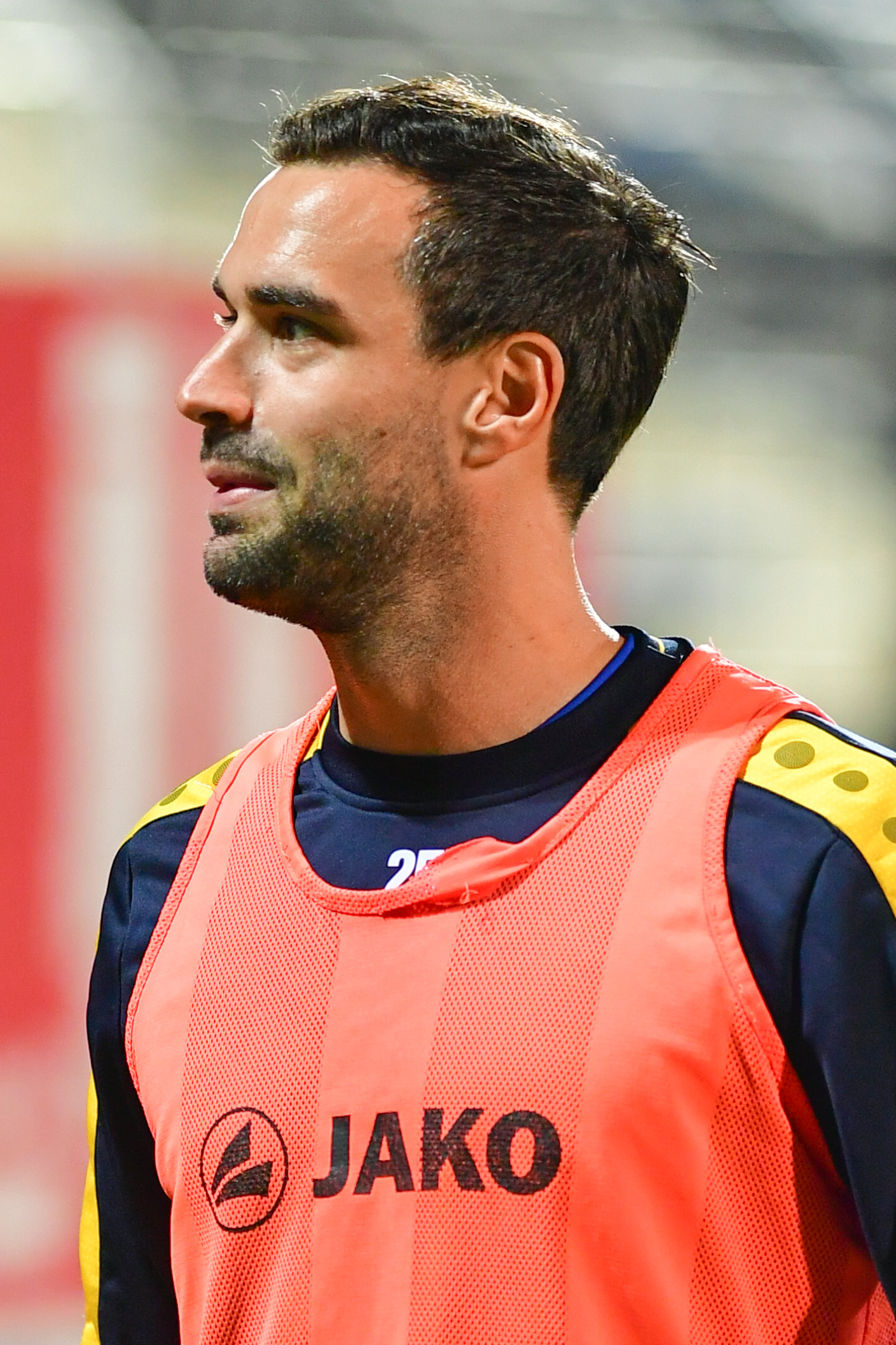 Fußball Bundesliga - FC Admira Wacker Mödling vs SKN St. Pölten. Bild zeigt Andreas Dober (SKN).